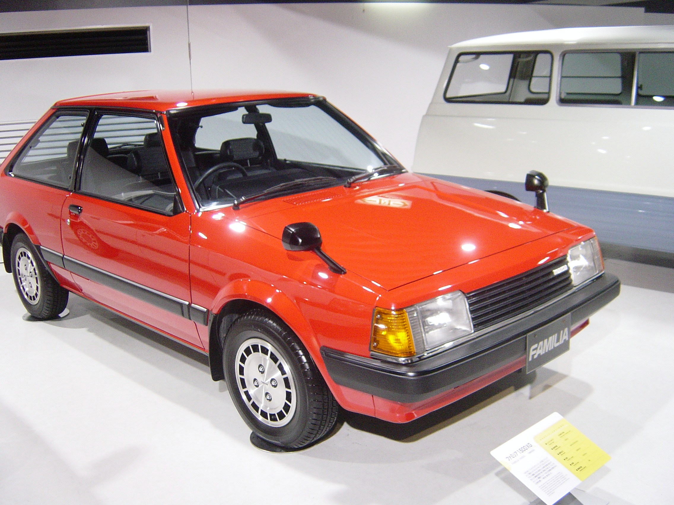 Mazda FAMILIA(マツダ・ファミリア),Mazda Museum